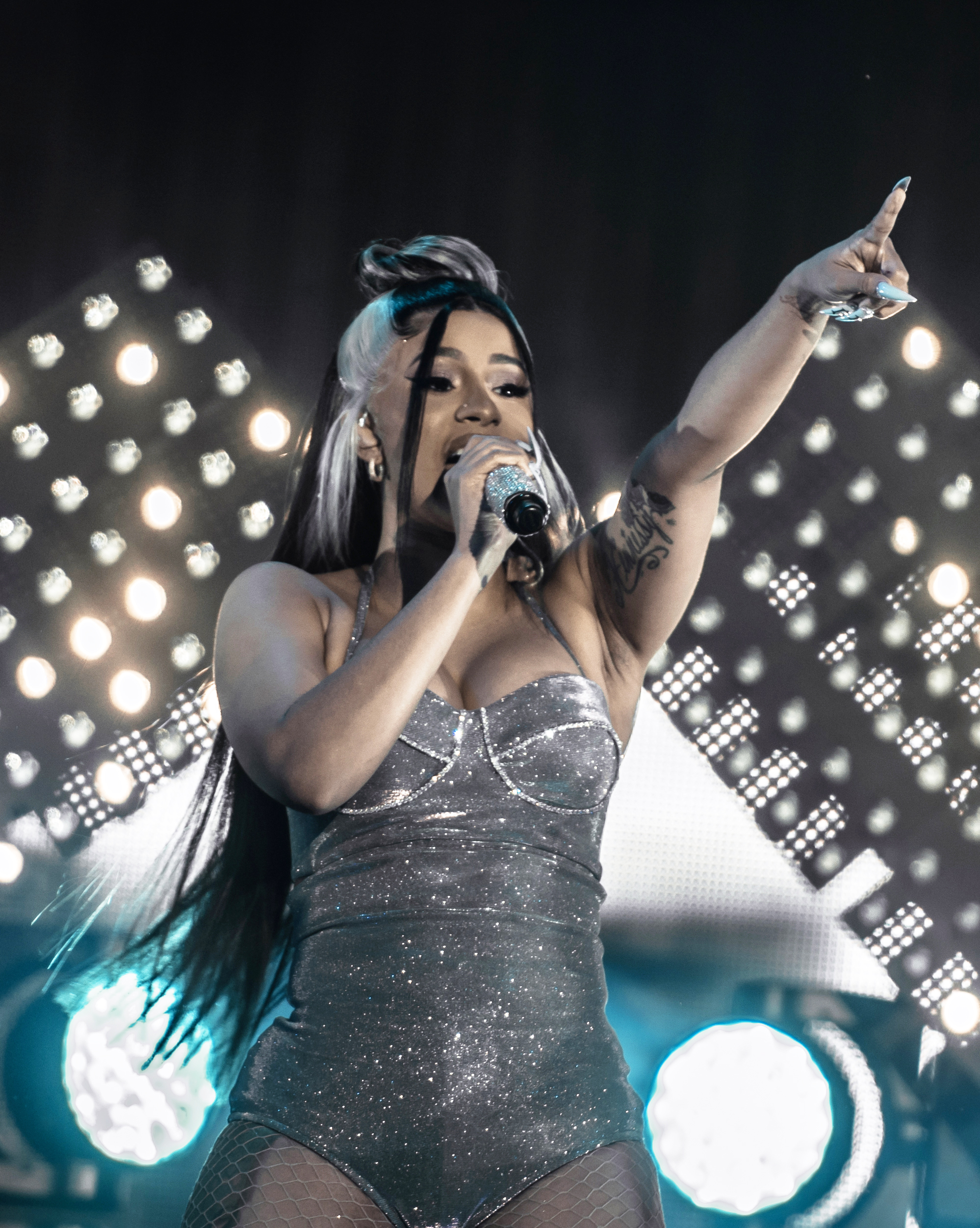 Cardi B live auf dem Openair Frauenfeld 2019